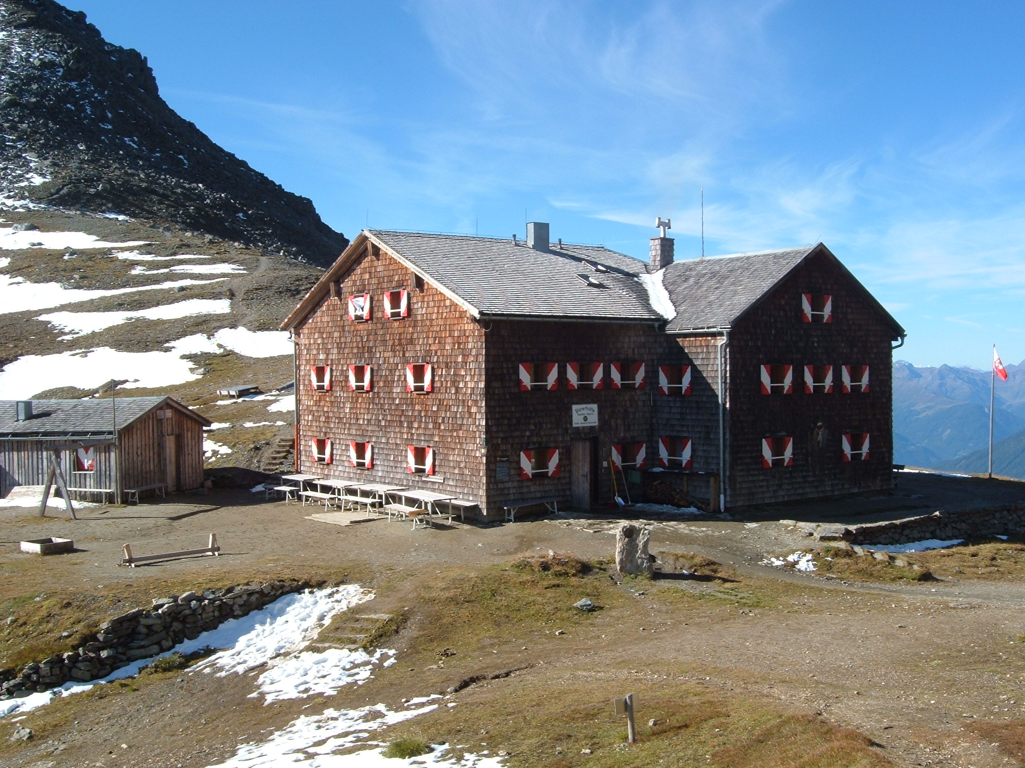 Glorerhütte in Österreich selbst fotographiert This media shows the remarkable cultural object in the Austrian state of Tyrol listed by the Tyrolean Art Cadastre with the ID 96786.